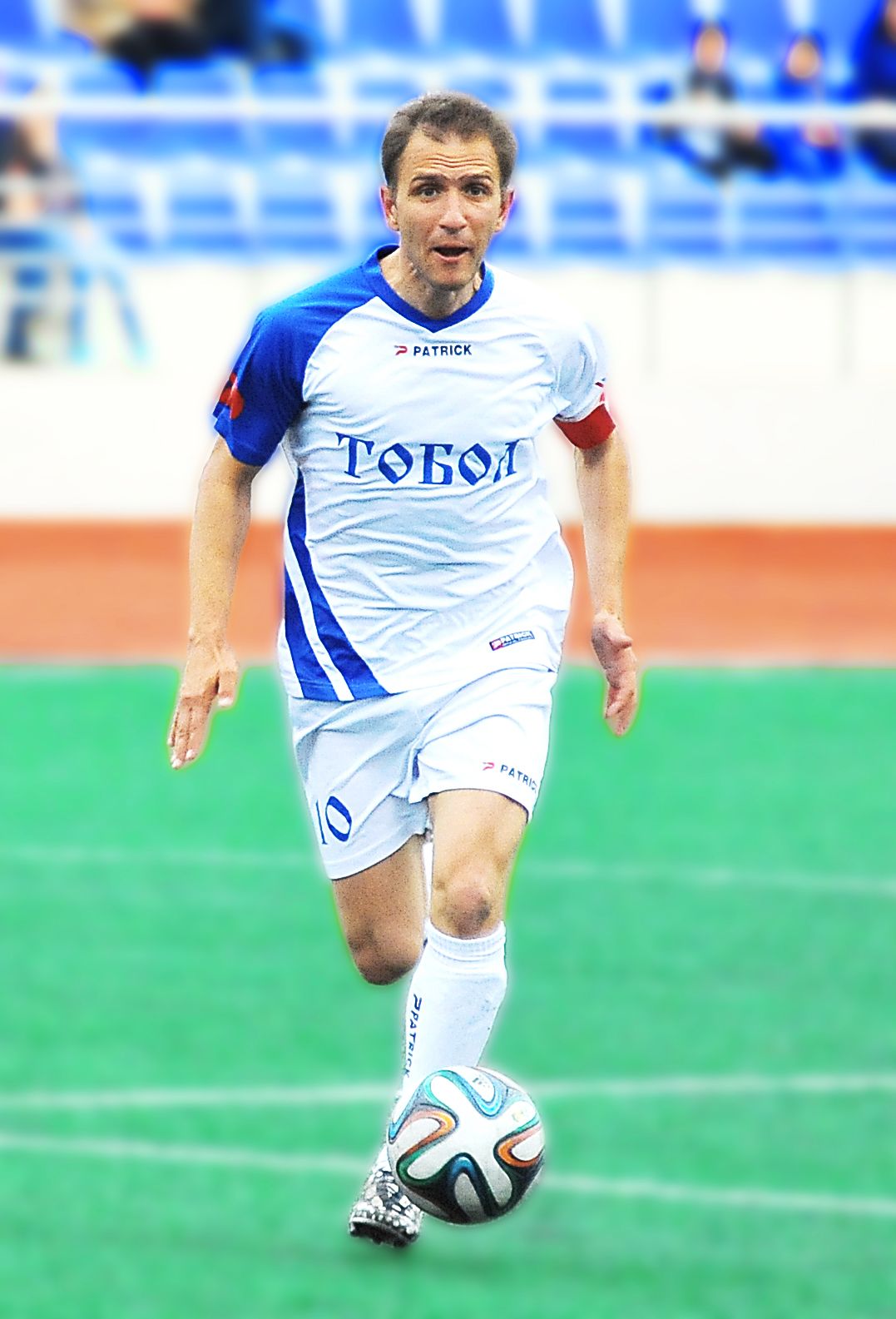 Иван Смородинов в домашней форме "Тобола" сезона 2015